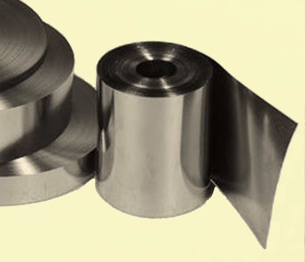 aufgewickeltes Band aus weichmagnetichem metallischen Glas